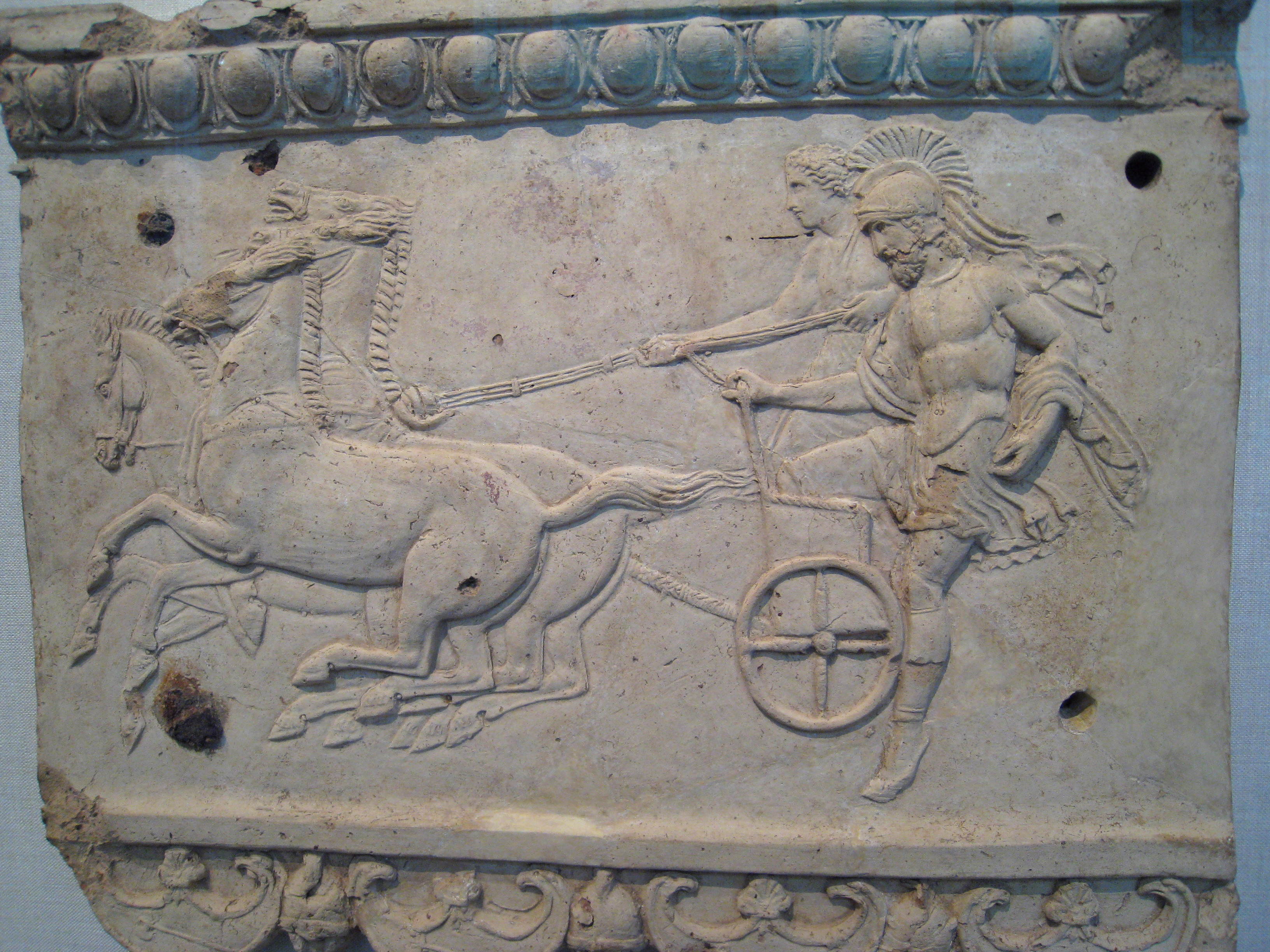 Oinomaus and Myrtilus racing